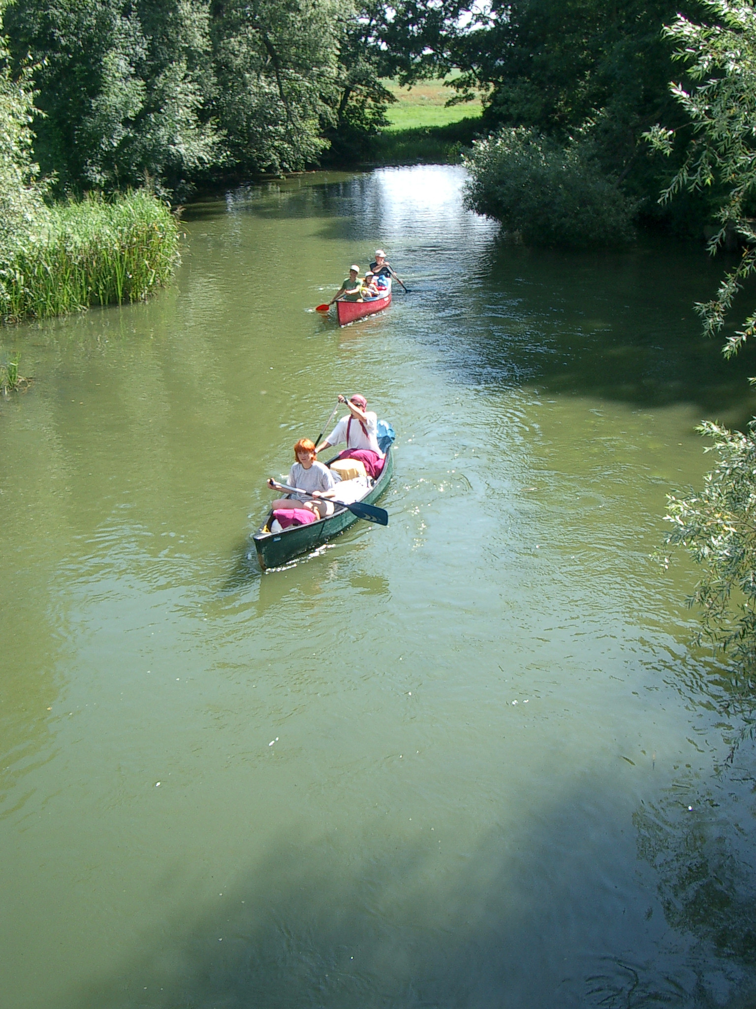 Wasserwandern auf der Mildenitz Autor: Frank Staude, fotografiert am 21.07.04: GNU-FDL Alle Personen auf dem Bild sind mit der Veröffentlichung einverstanden.